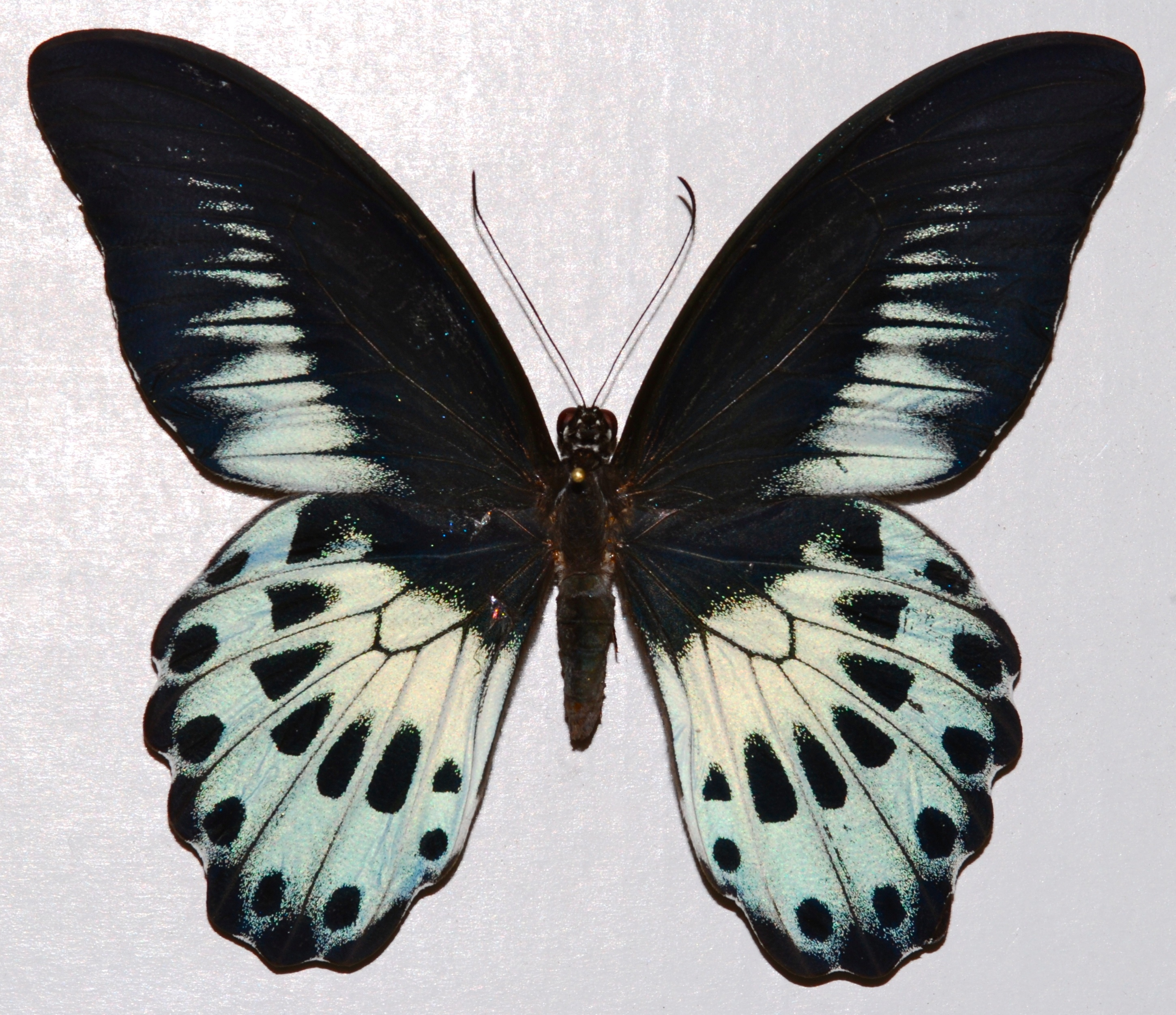 Colombo, Sri Lanka